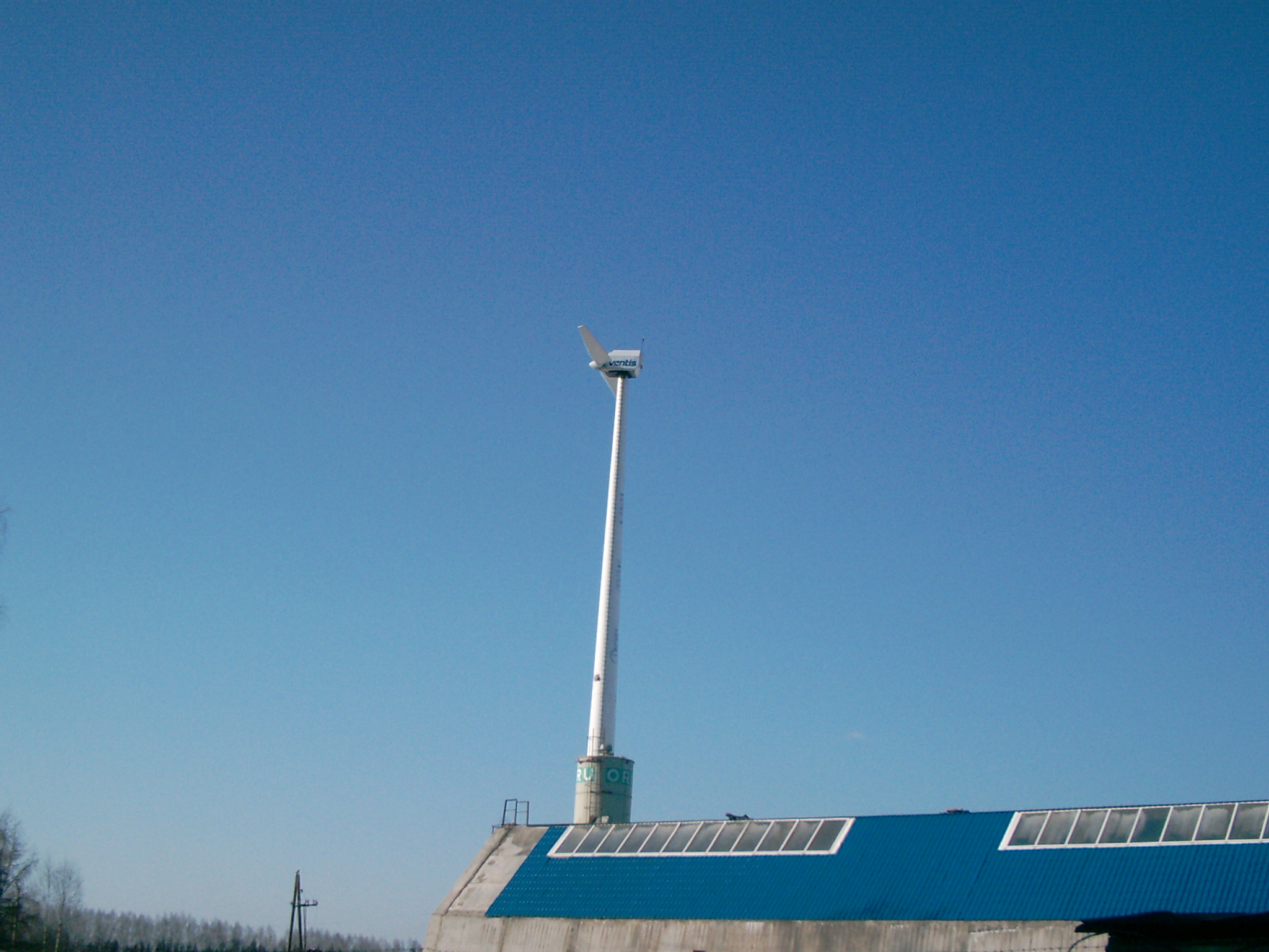 Ветровой электрогенератор на одном из предприятий. Нововятский район, г. Киров